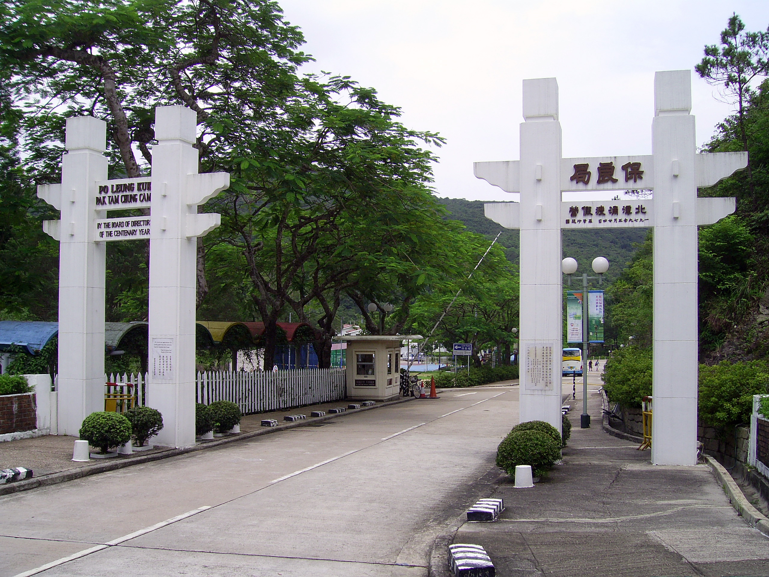 中文（香港）: 保良局北潭涌渡假營